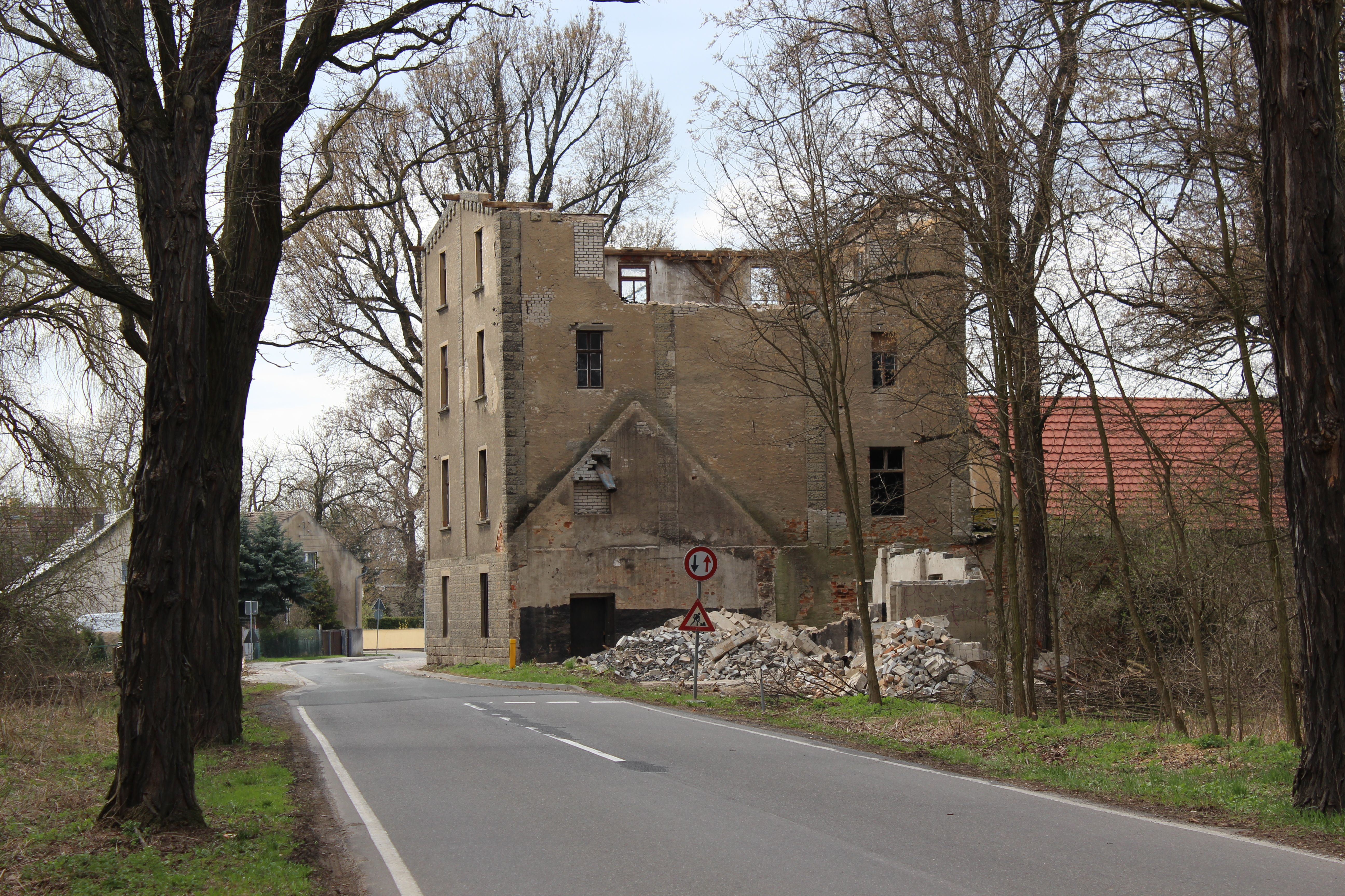 Abrissarbeiten der einstigen Wassermühle in Prieschka.